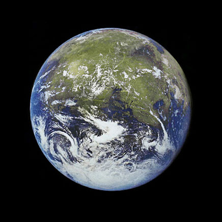 Der Mars nach erfolgreichem Terraforming (von mir erstellte Fotomontage) aus zwei NASA-Bildern: Die Erde, aufgenommen von Apollo 17 und der Mars aufgenommen vom Viking 1 Orbiter. Beide Bilder sind unter den Wikipedia-Einträgen "Erde" und "Mars" im Original zu sehen. Dort finden sich nähere Informationen zu den Ursprungsbildern.